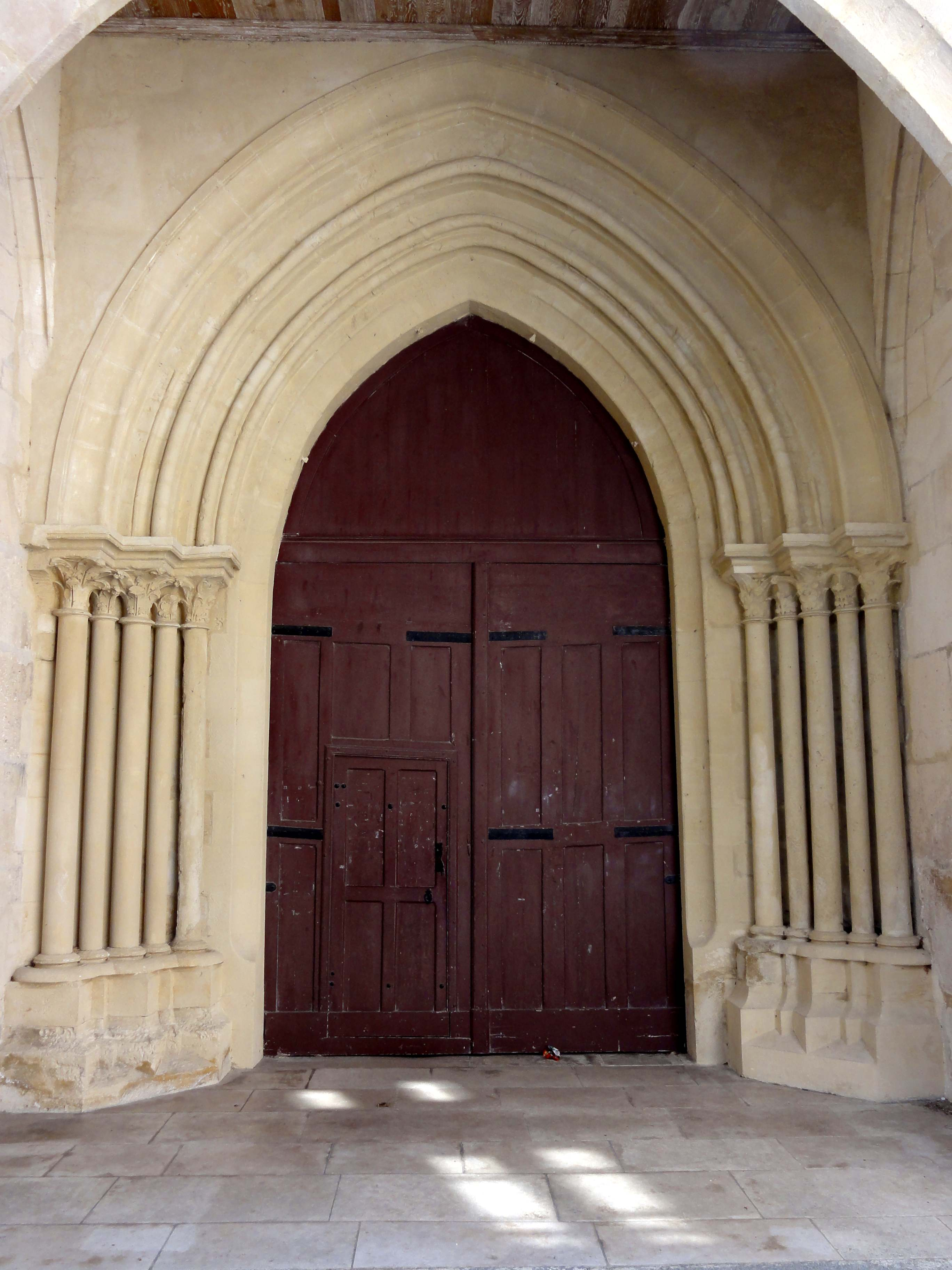 Église Saint-Germain d'Andrésy - voir titre.